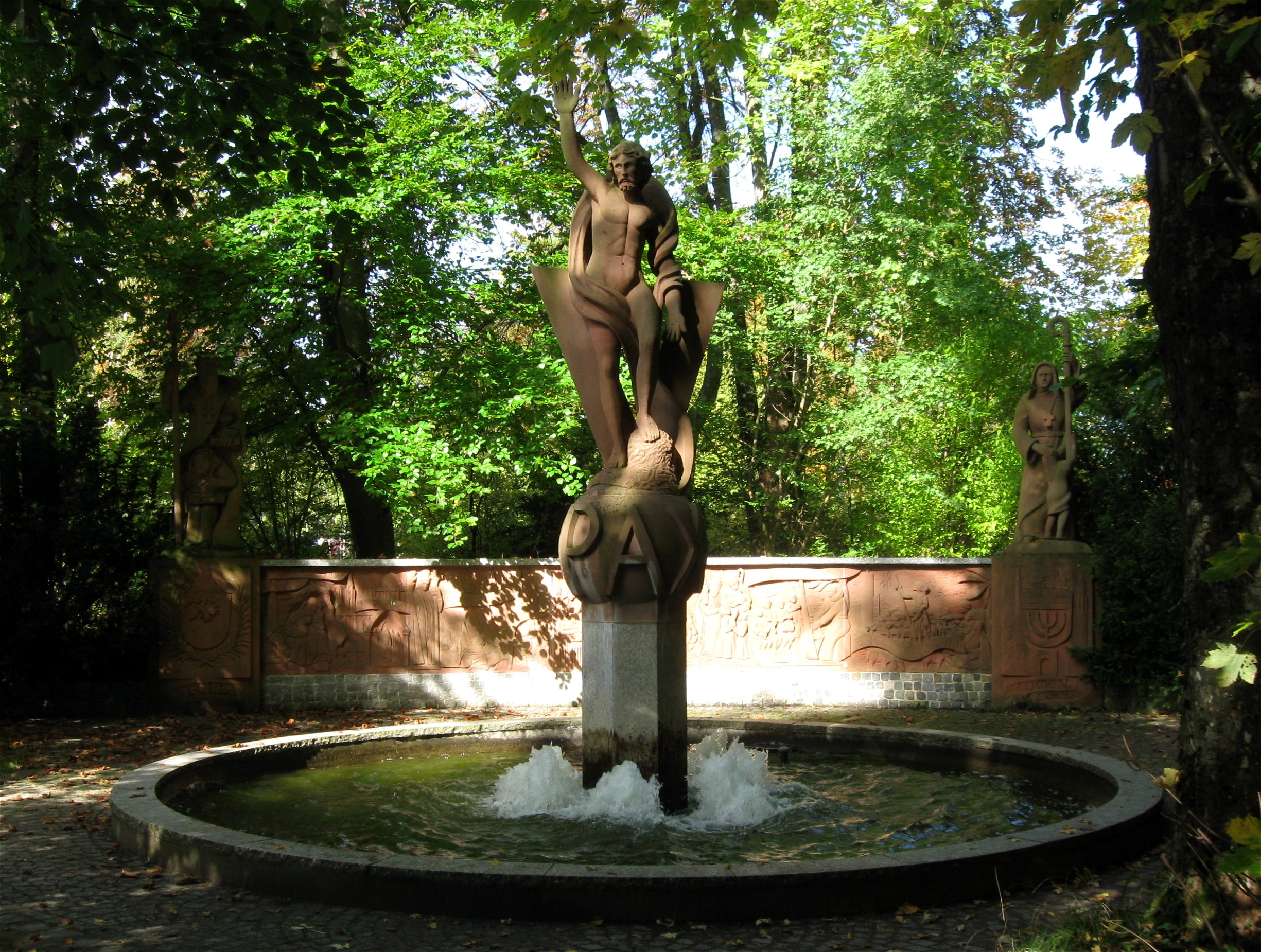 Brunnenanlage auf dem Klostergelände von St. Ottilien, Eresing